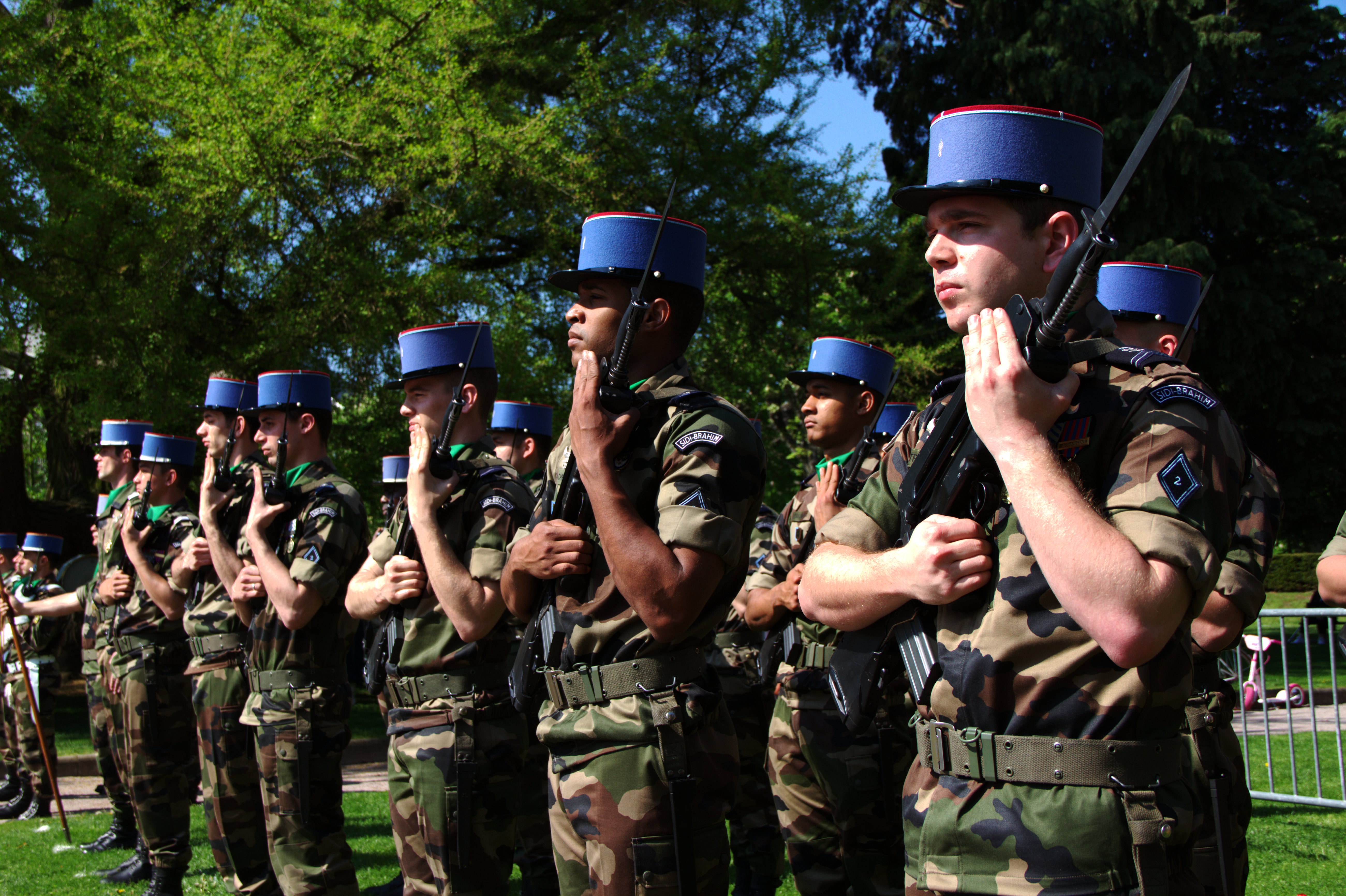 Cérémonie commémorative du 8-mai-1945 Strasbourg, place de la République 8 mai 2013